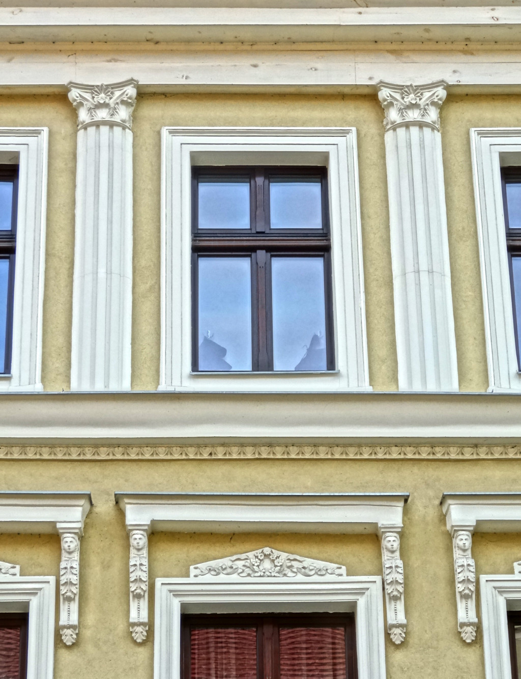 Kamienica przy ul. Długiej 48 w Bydgoszczy (kon. XVIII w.)